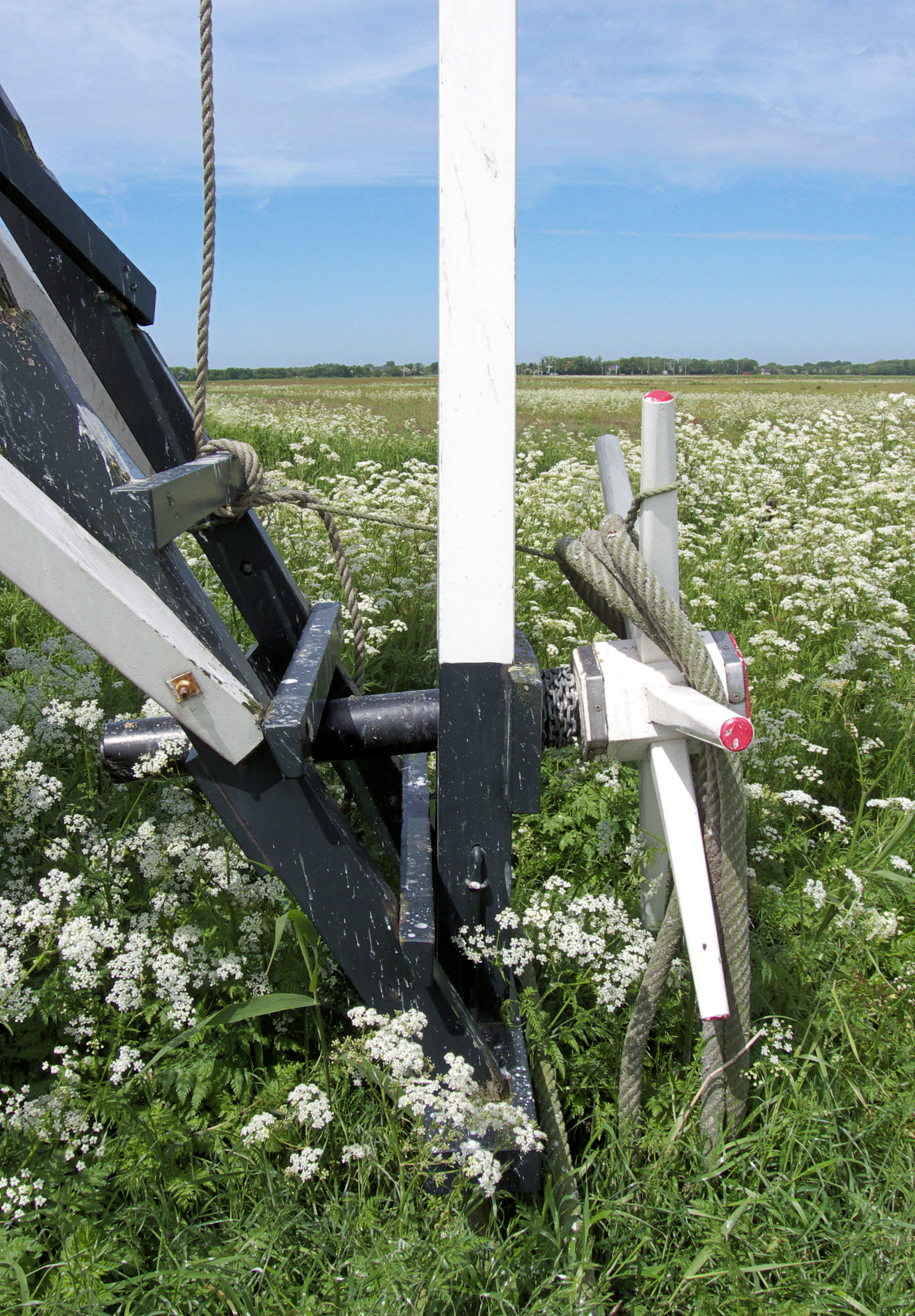 Molen De Kemphaan, Texel, kruirad